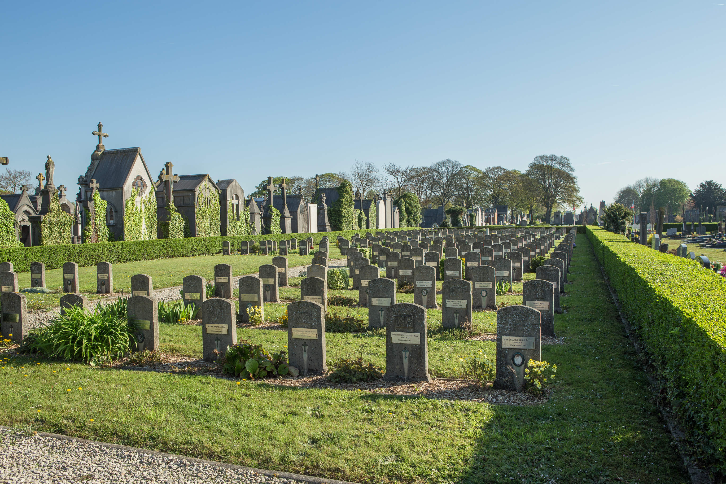 Tourcoing (Pont-Neuville) Communal Cemetery